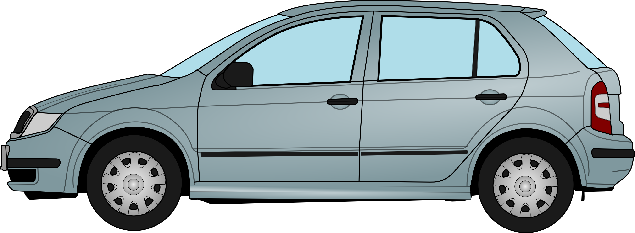 Profilzeichnung